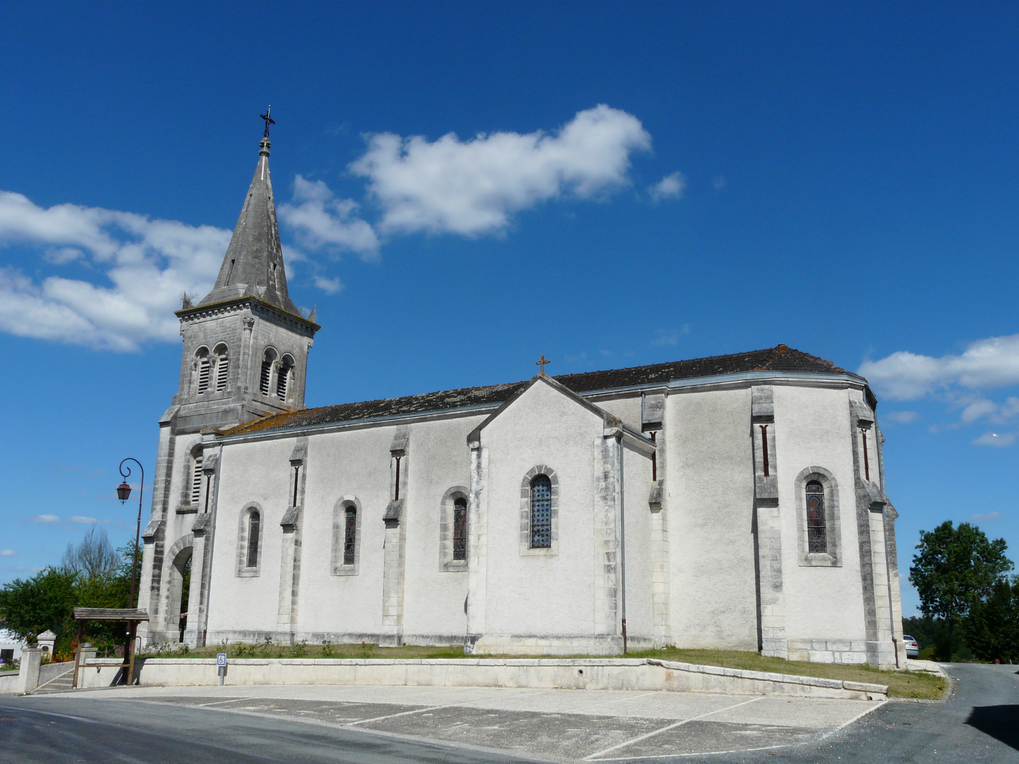 Le côté sud de l'église Notre-Dame de l'Assomption, Échourgnac, Dordogne, France.